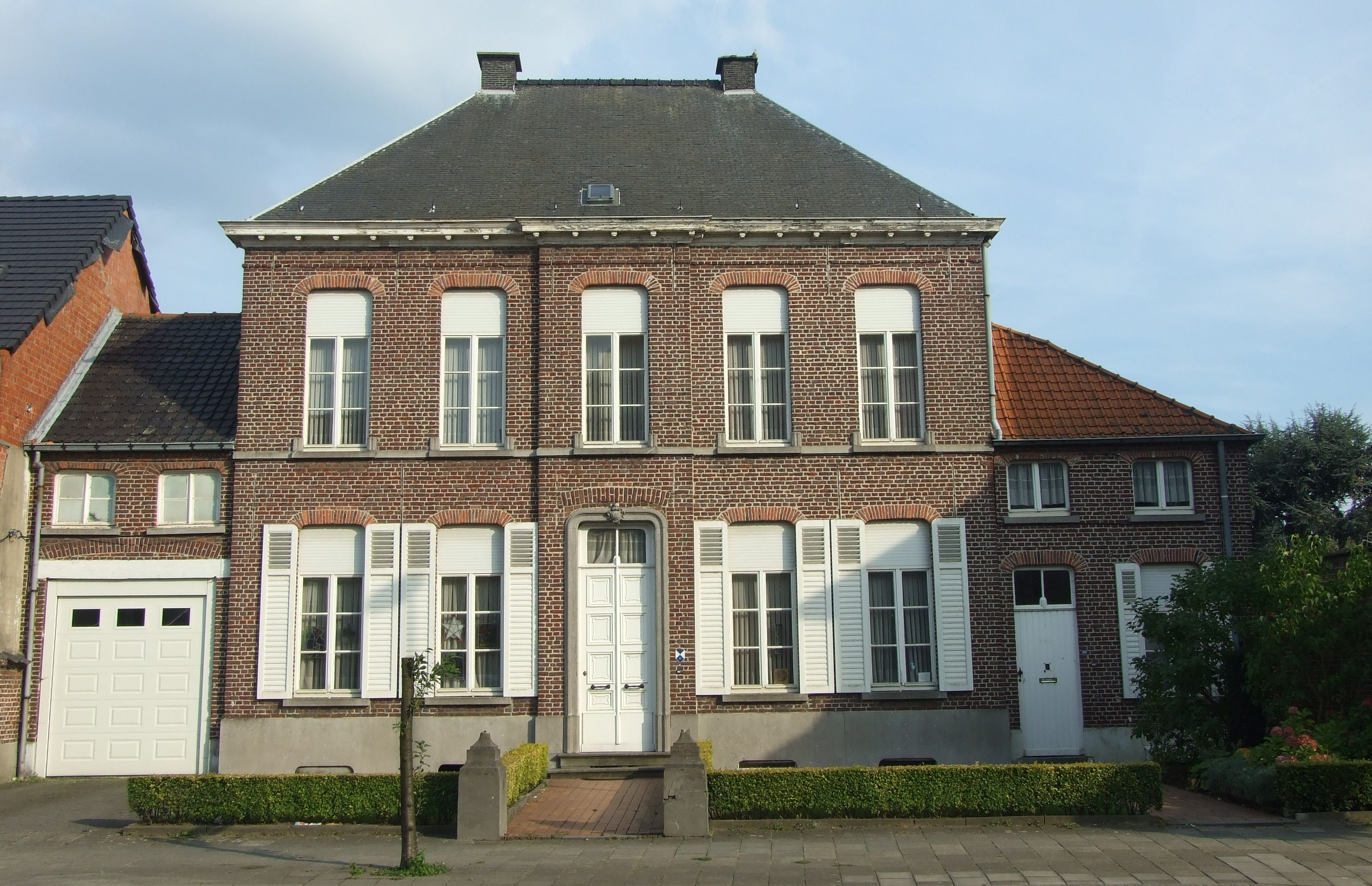 Pastorij van Herdersem (België)